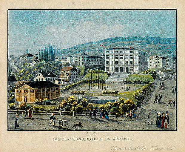 Das Gebäude der alten Kantonsschule von Gustav Albert Wegmann in Zürich, Rämistrasse 59, im 19. Jahrhundert. Farbaquatinta, 7 x 9,5 cm. Verlegt bei Heinrich Fuessli & Co., Zürich.